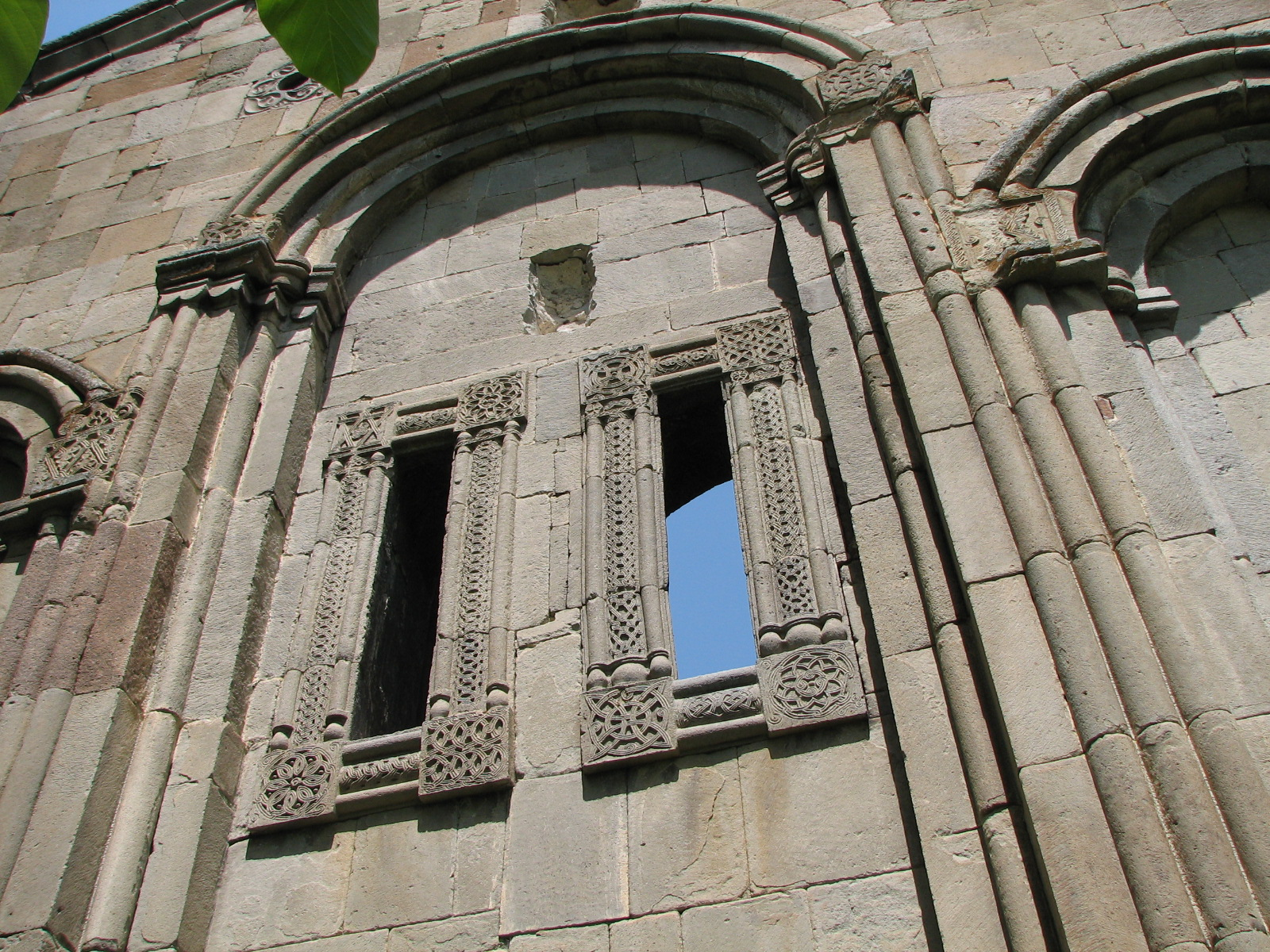 Тбети, Кларджети, Турция. Май 2008